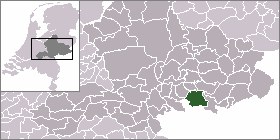 Locatie voormalige gemeente Bergh. Afbeelding gemaakt door gebruiker:Mtcv en vrij te gebruiken.